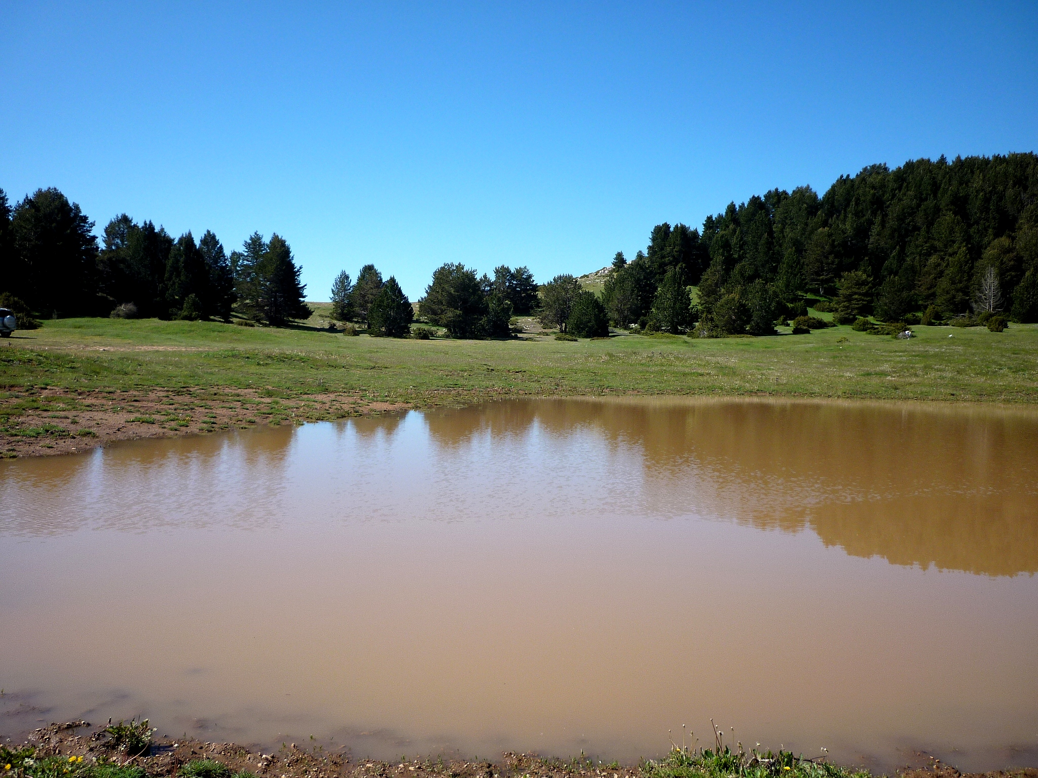 Estany de Pratmajor i, al fons, la collada de l'Estany.